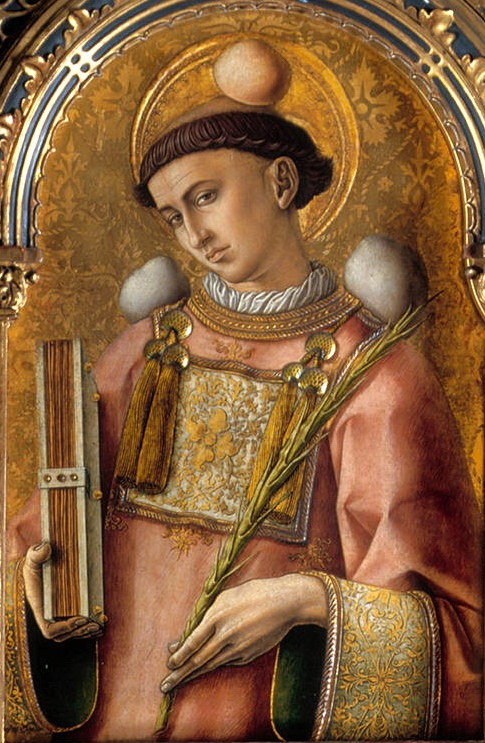 Polittico del 1476, s. stefano